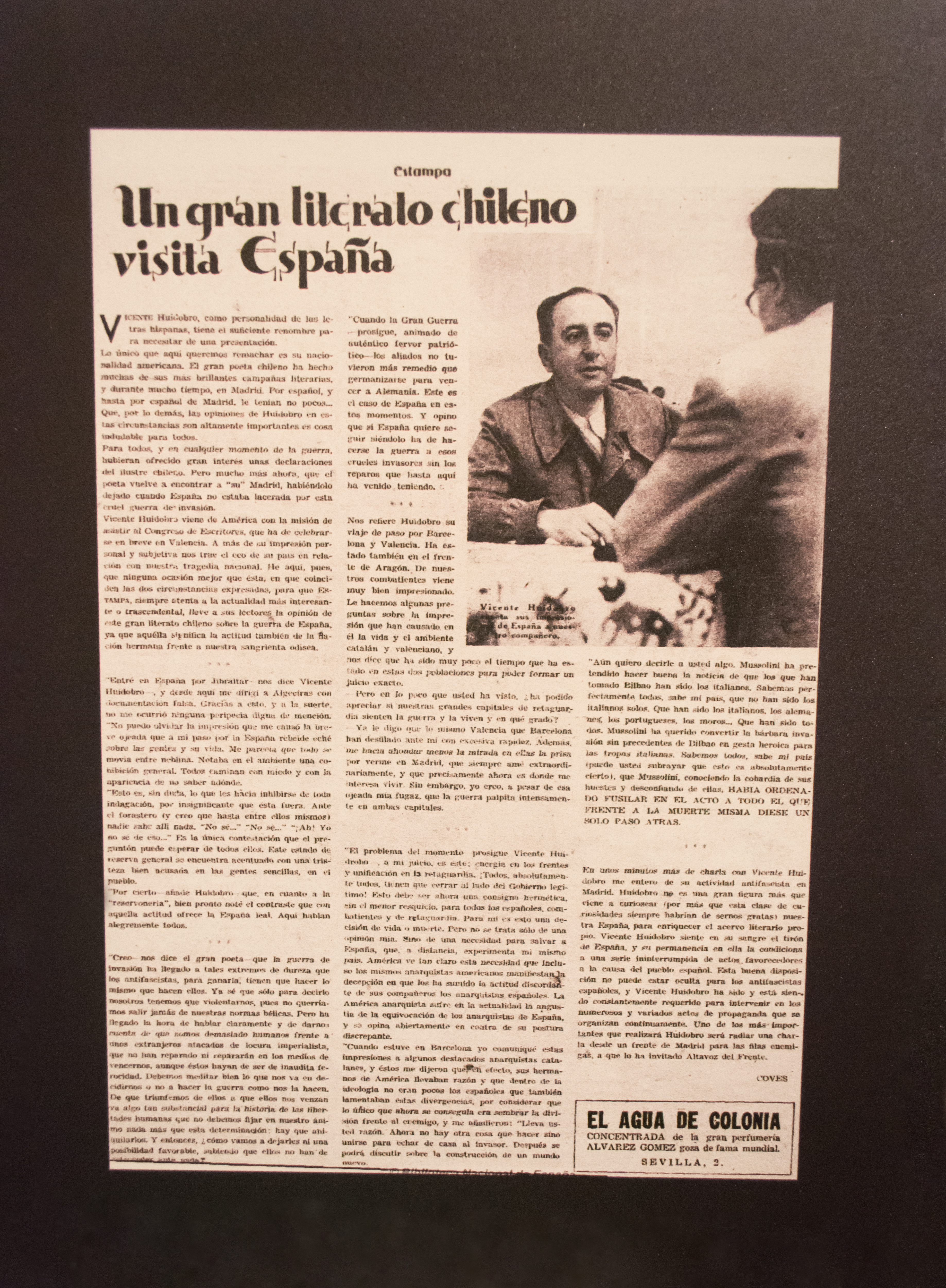 Noticia sobre Vicente Huidobro en el Segundo Congreso Internacional de Escritores para la Defensa de la Cultura. Exposición Por la defensa de la Cultura en el Centro del Carmen de Valencia.